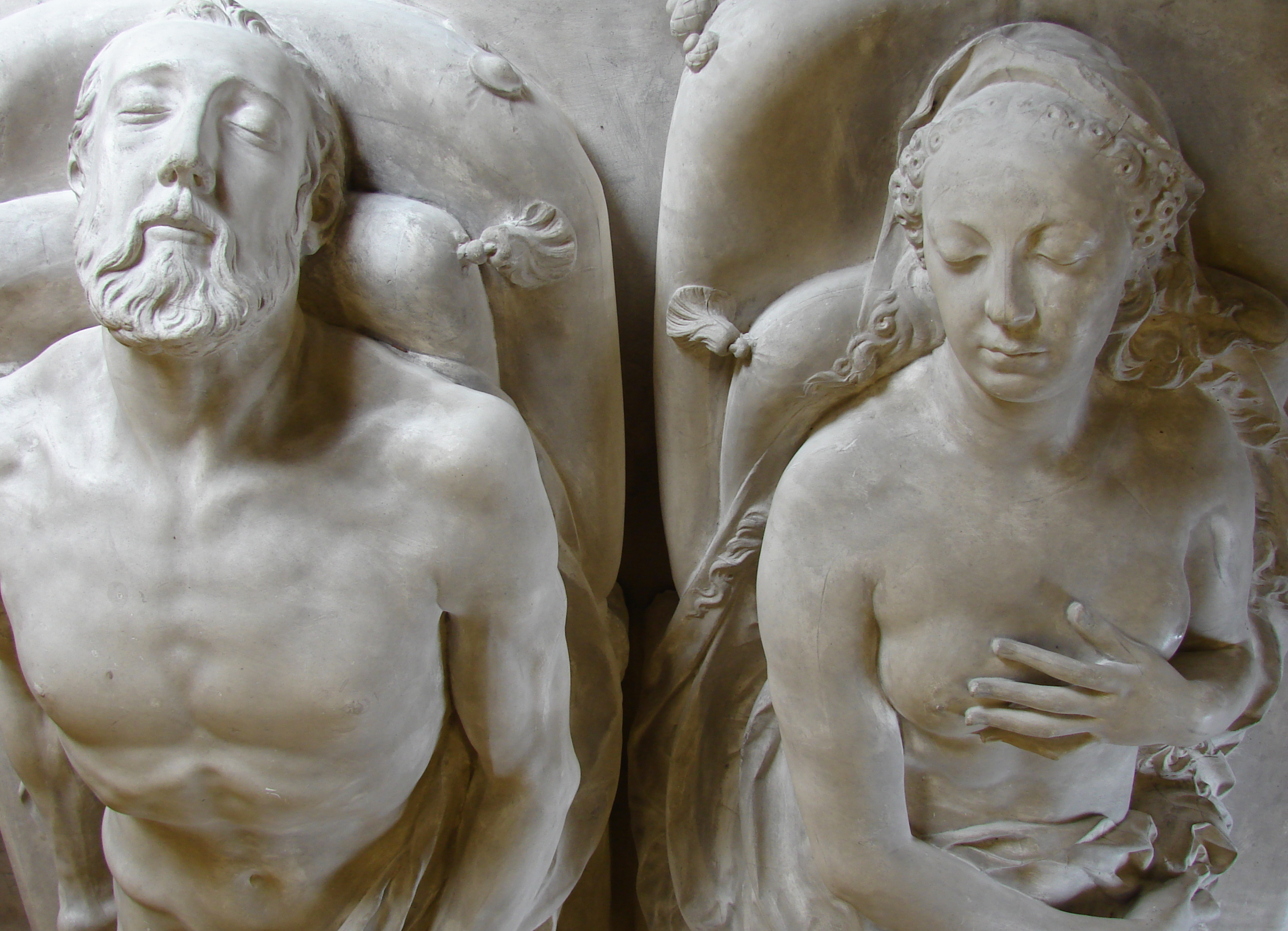 Henri II & Catherina af Medici, gravmæle fra Basilique Saint-Denis, Pilon (-1590), gibsafstøbning i Den Kongelige Afstøbningssamling, København